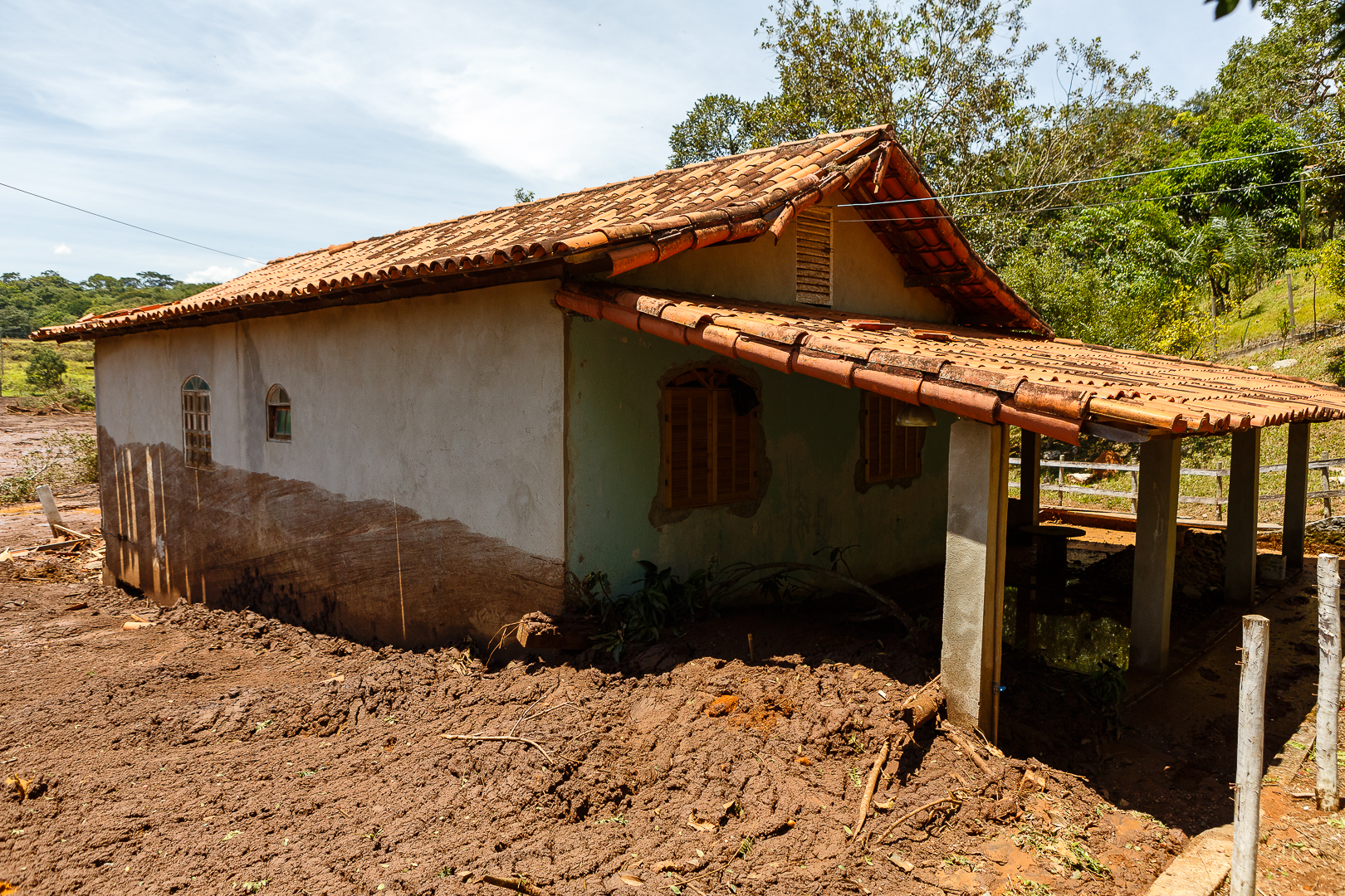 Wiki Expedição Brumadinho - Fevereiro de 2019 - Brumadinho - MG - Brasil.